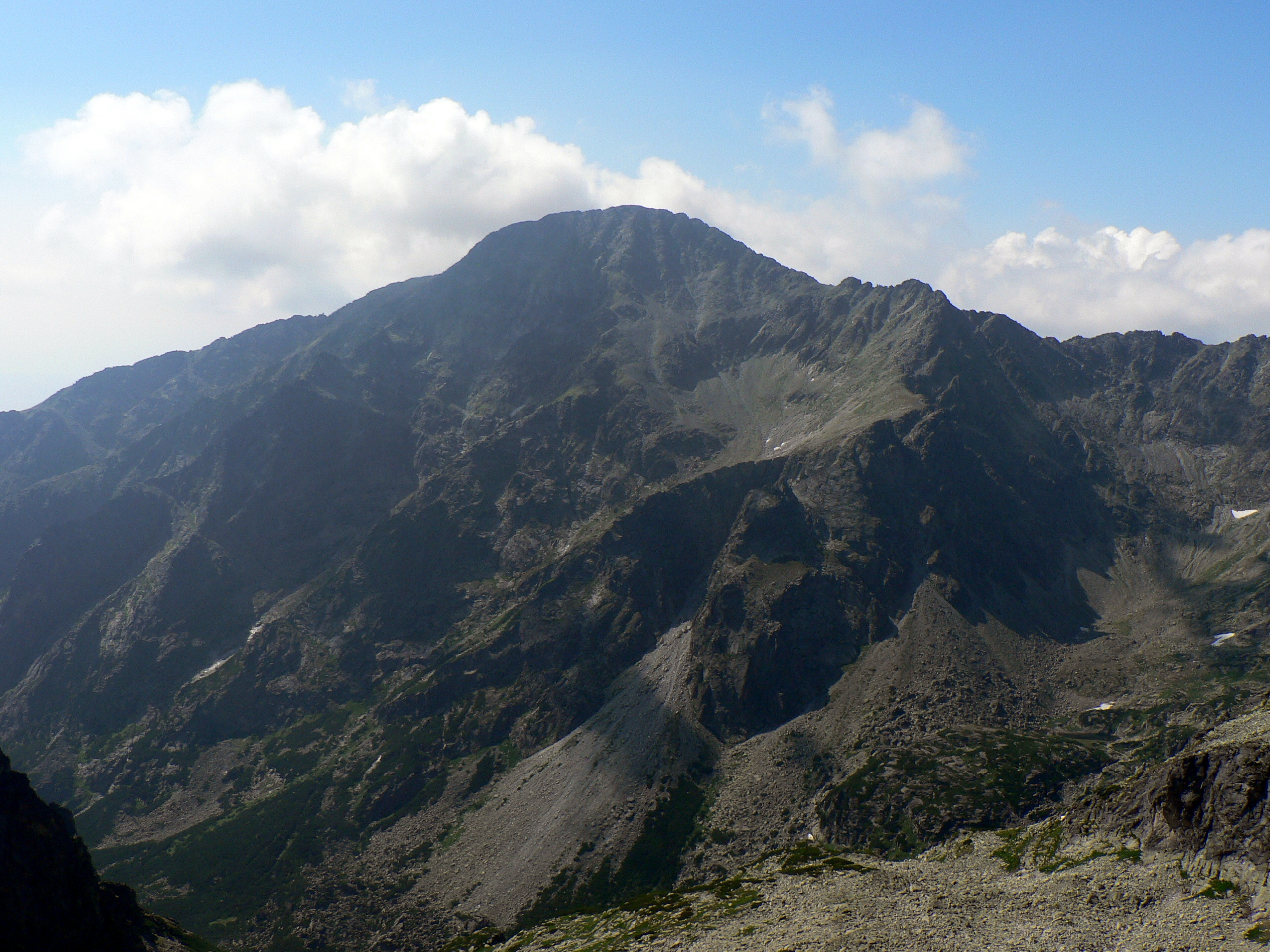 Sławkowski Szczyt ze szlaku z Czerwonej Ławki